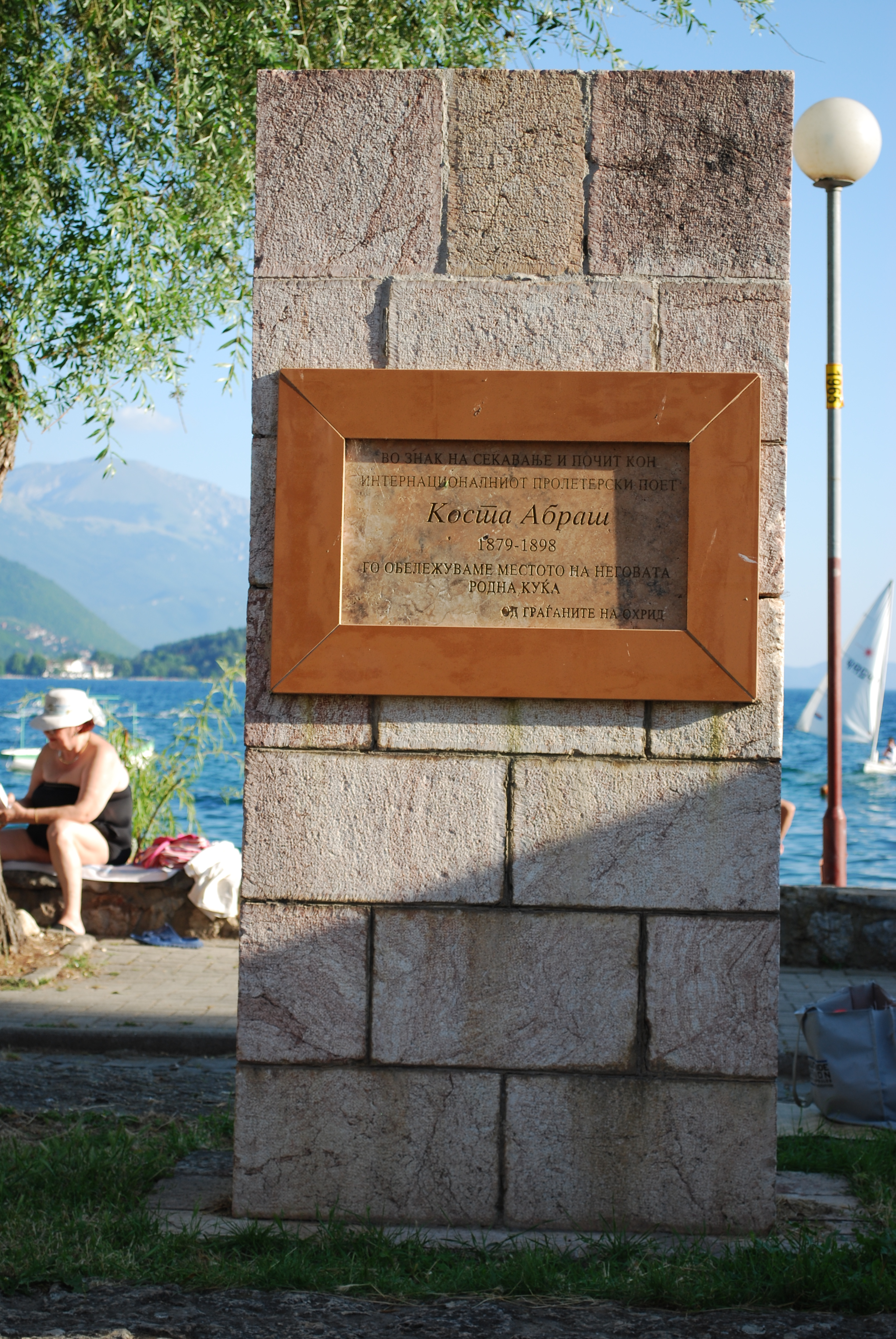 Местото кадешто се наоѓала родната куќа на писателот Коста Абраш во Охрид, Македонија